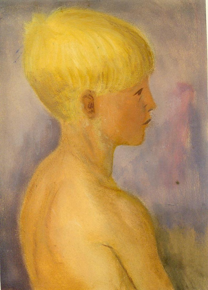 Knabenbildnis